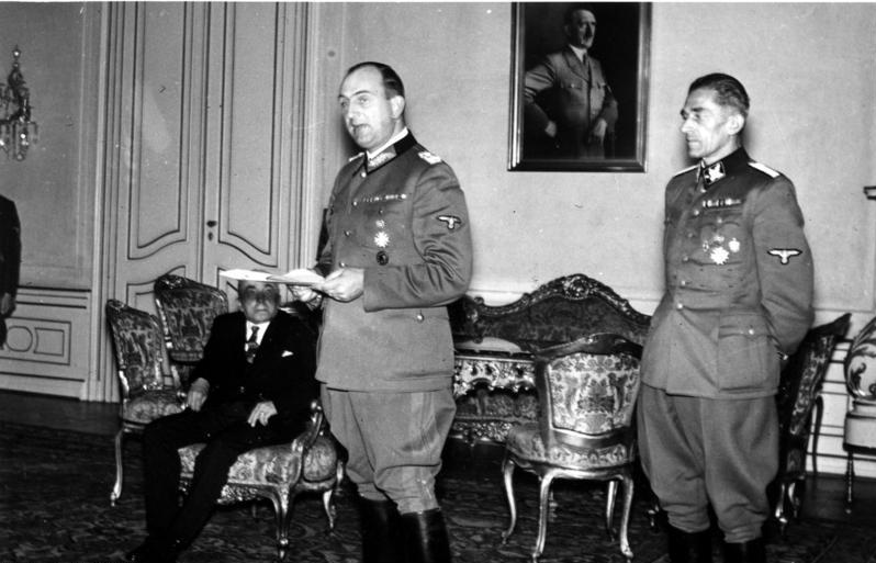 Dr. Hacha, Daluege, K. H. Frank